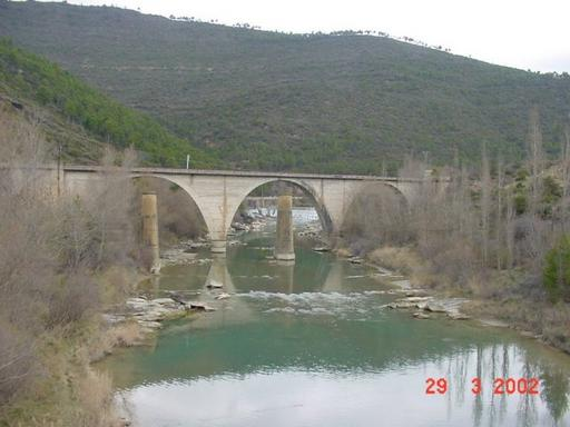 Riso Gallego Rasal